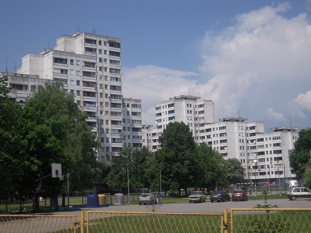 Neboderi_u_Boriku_(Banja_Luka)